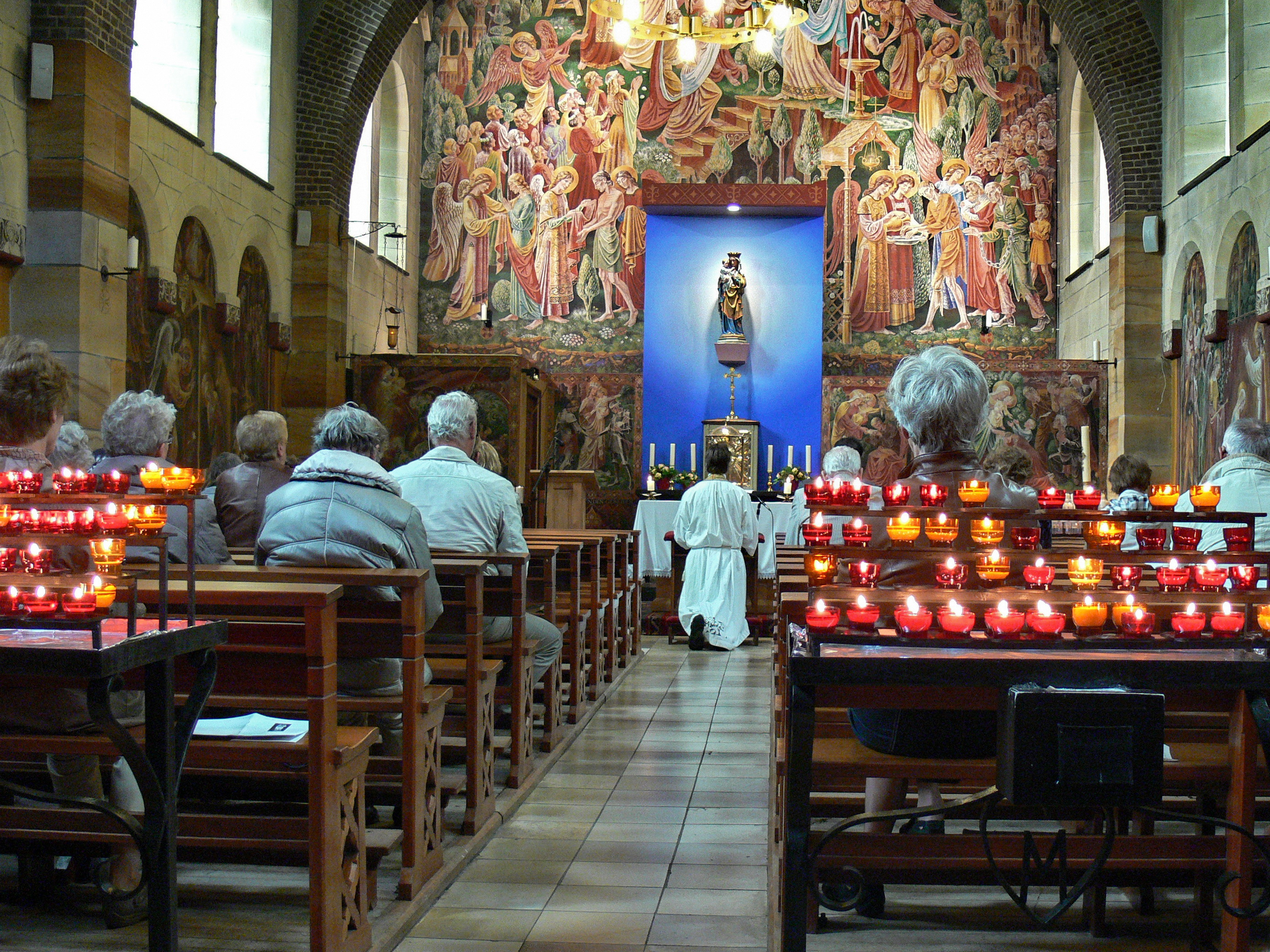 Twee rijen banken staan naar het noordelijk Maria-altaar gericht. De communiebank is vervaardigd door Nico Witteman. De ex-votokast is van de hand van Koldewij. Het Maria-beeld is in 1908 gemaakt door Hans Mengelberg en in 1923 beschilderd. De zijmuren bestaan uit mergelblokken die onder de ramen zijn beschilderd door han Bijvoet in 1930 en 1941. De taferelen op de linkermuur stellen voor van links naar rechts: de opdracht in de tempel; de geboorte van Christus; de Visitatie. De rechterwand bevat van links naar rechts: de kroning van Maria; de kruisiging; de onderwijzing in de tempel. De achterwand (N) vertoont centraal het hemels gastmaal en vlakken met onder andere Maria koningin van de vrede; hulp der zieken; Onze Lieve Vrouw ter Nood. In de kerkruimte hangen twee kronen.